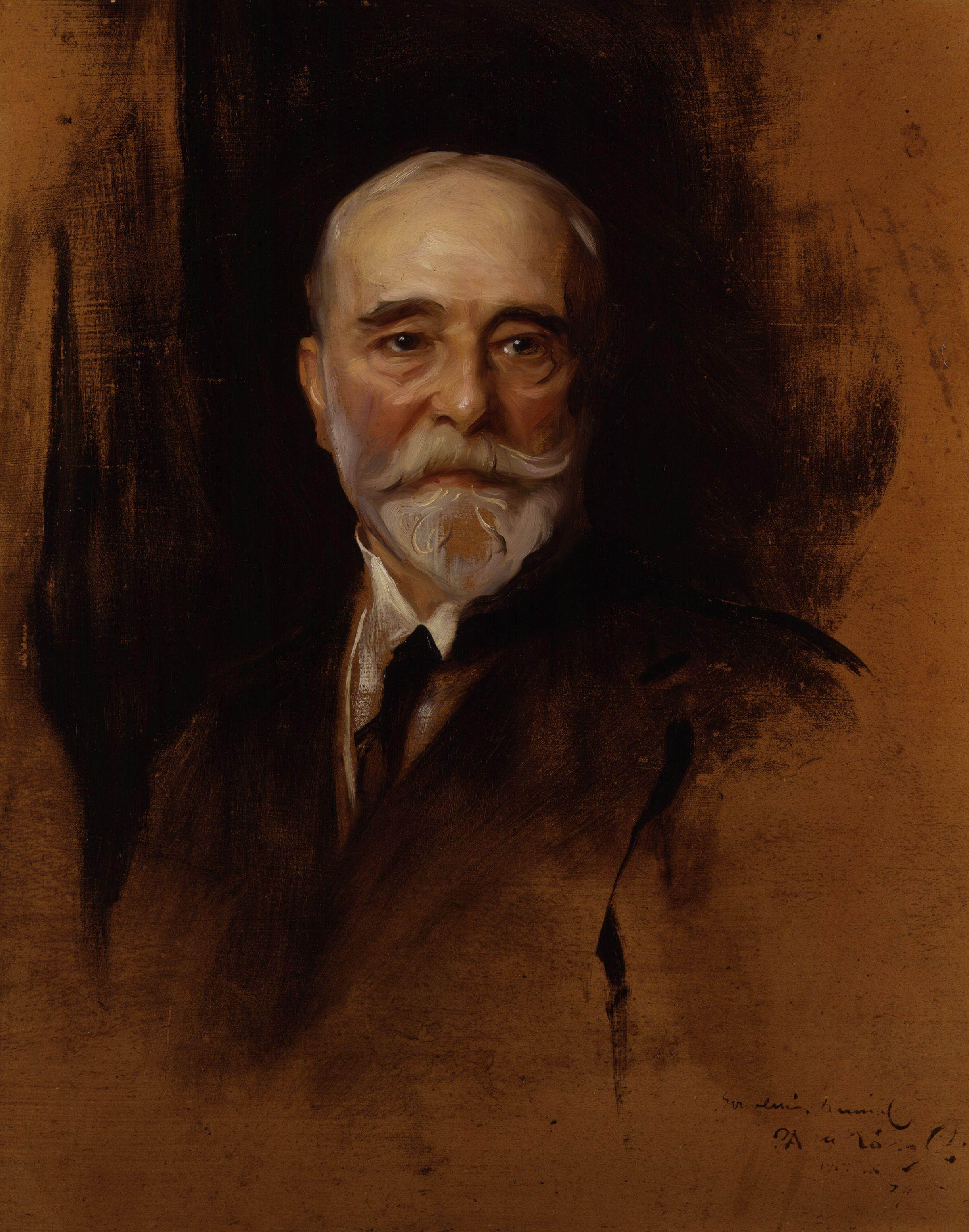 Sir (Samuel) Luke Fildes